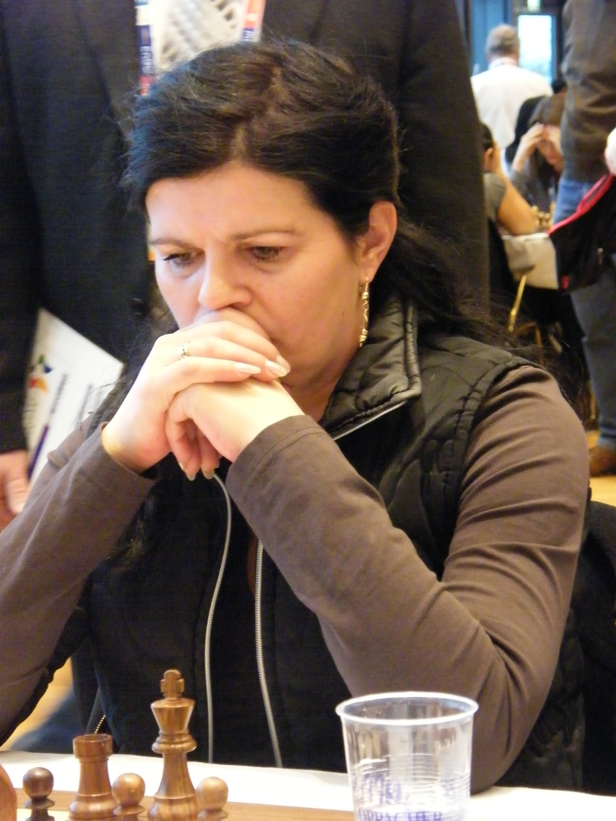 Mirjana Medic bei der 38. Schacholympiade in Dresden 2008